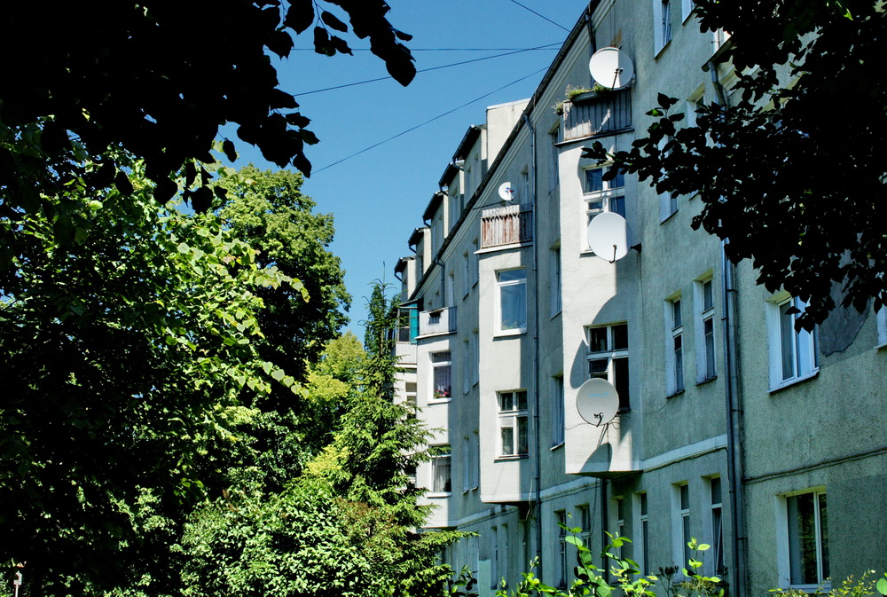 ul. Komsomolskaia (Luisenallee)